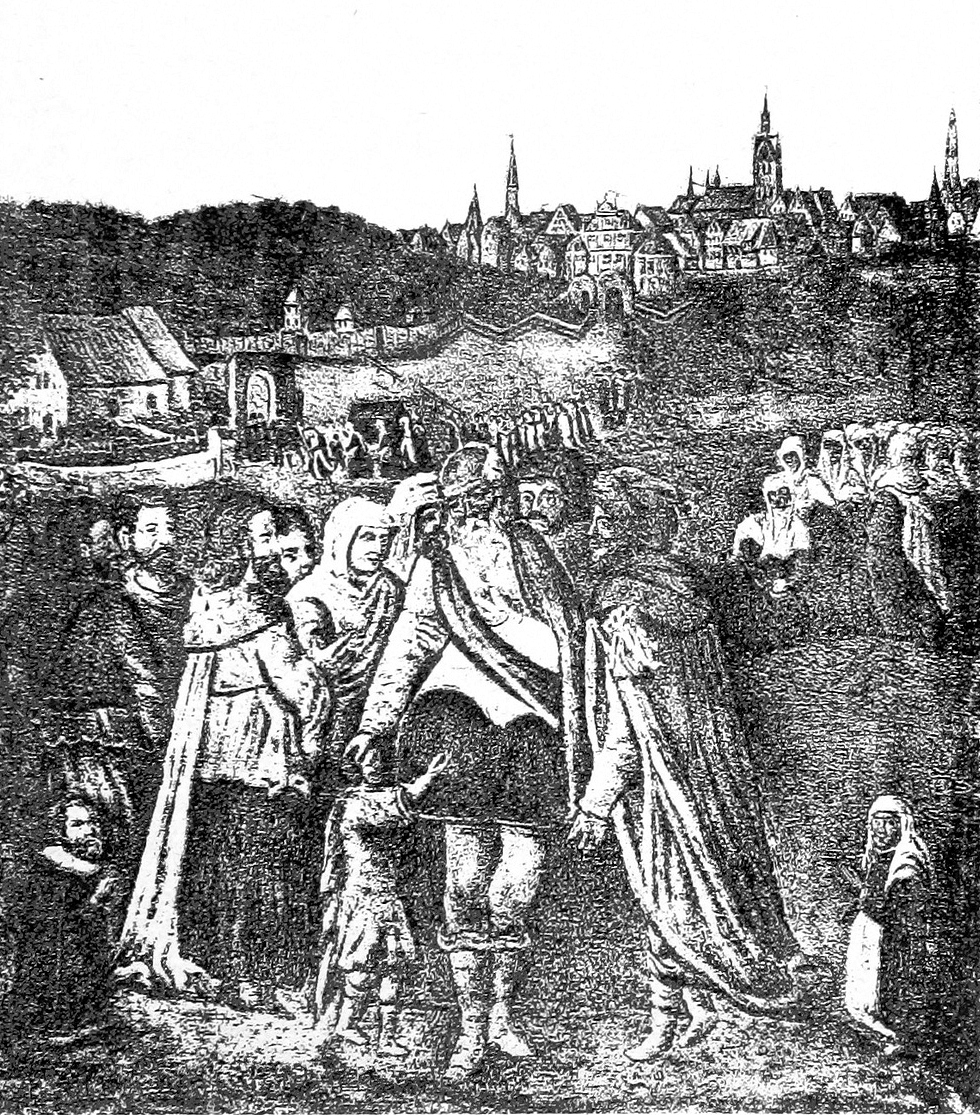 Fotolithografischer Druck eines Ölgemäldes aus dem 16. Jahrhundert mit der Darstelltung des Heilgen Nikolaus von Myra, der hier zum Teil von Männern mit Turban angebetet wird. Im Hintergrund ist der Alte St.-Nikolai-Friedhof und die Nikolaikapelle vor Hannover zu sehen, zu der ein Leichenzug prozessiert. Im Hintergrund ist das Steintor zu sehen als Teil der damaligen Stadtbefestigung Hannovers, hinter denen sich die höheren Kirchtürme der Markt-, der Aegidien- sowie der Kreuzkirche erheben. Die kleineren Turmspitzen etwa in der Bildmitte gehören noch zu dem ehemaligen Minoritenkloster, an dessen Stelle der Herzog Georg später mitten im Dreißigjährigen Krieg das Leineschloss errichten wird. Das Bild (eines noch unidentifizierten Malers) mit der (Seiten?-)Nummer 12a entstammt dem von dem Historiker August Jugler (1833-1888) herausgegebenen Buch Aus Hannovers Vorzeit. Ein Beitrag zur deutschen Cultur-Geschichte ... Mit 23 photolithographischen Abbildungen, etc. und wurde ursprünglich 1883 von der Aubeldruck-Anstalt, Aubel & Kaiser, Lindenhöhe [38 b] bei Cöln gedruckt. Das hier zu sehende Digitalisat wurde im Rahmen einer umfangreicheren Aktion der British Library auf der Plattform Flickr hochgeladen (anstatt direkt hier bei Commons), von dort in höchstmöglicher Größe heruntergeladen, dann mit einem Foto-Bearbeitungsprogramm per "Autokontrast" abgedunkelt und endlich hier hochgeladen. Der Begleittext aus dem Buch fehlt noch - und enthält möglicherweise den Hinweis auf den ursprünglichen Urheber ...